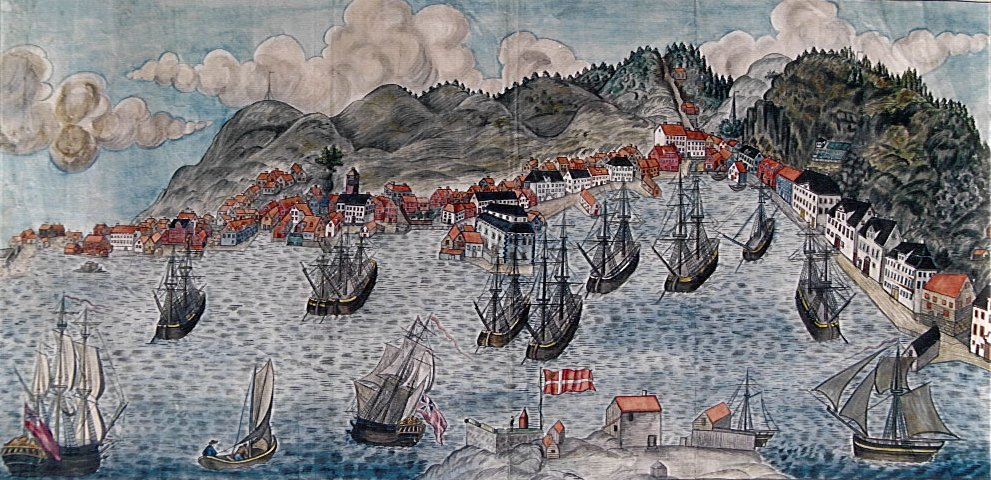 Batteriet på Holmen, Risør var også landstasjon for kanonbåtdivisjonen.